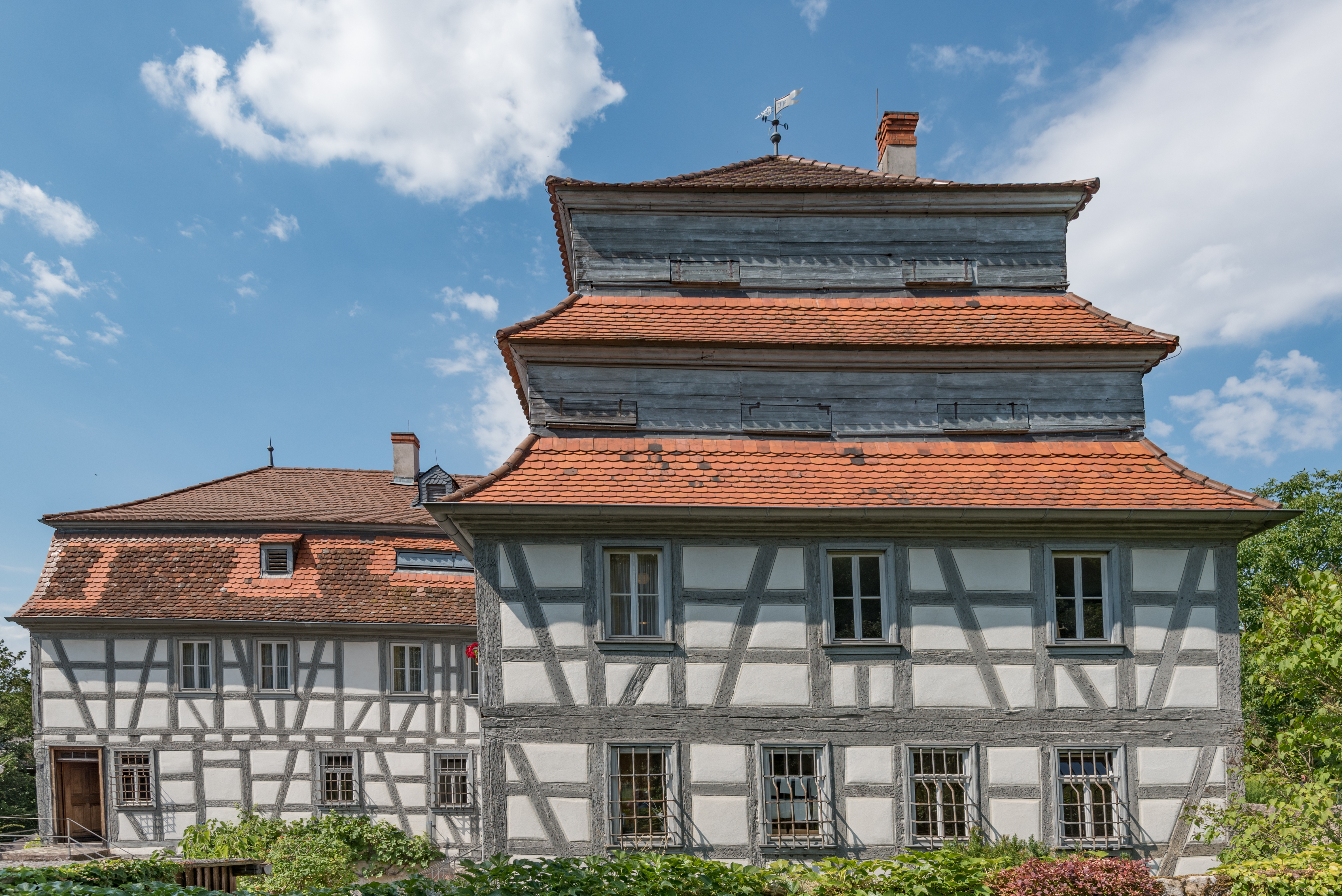 Triefenstein, Homburg am Main ,Gartenstraße 11, Papiermühle